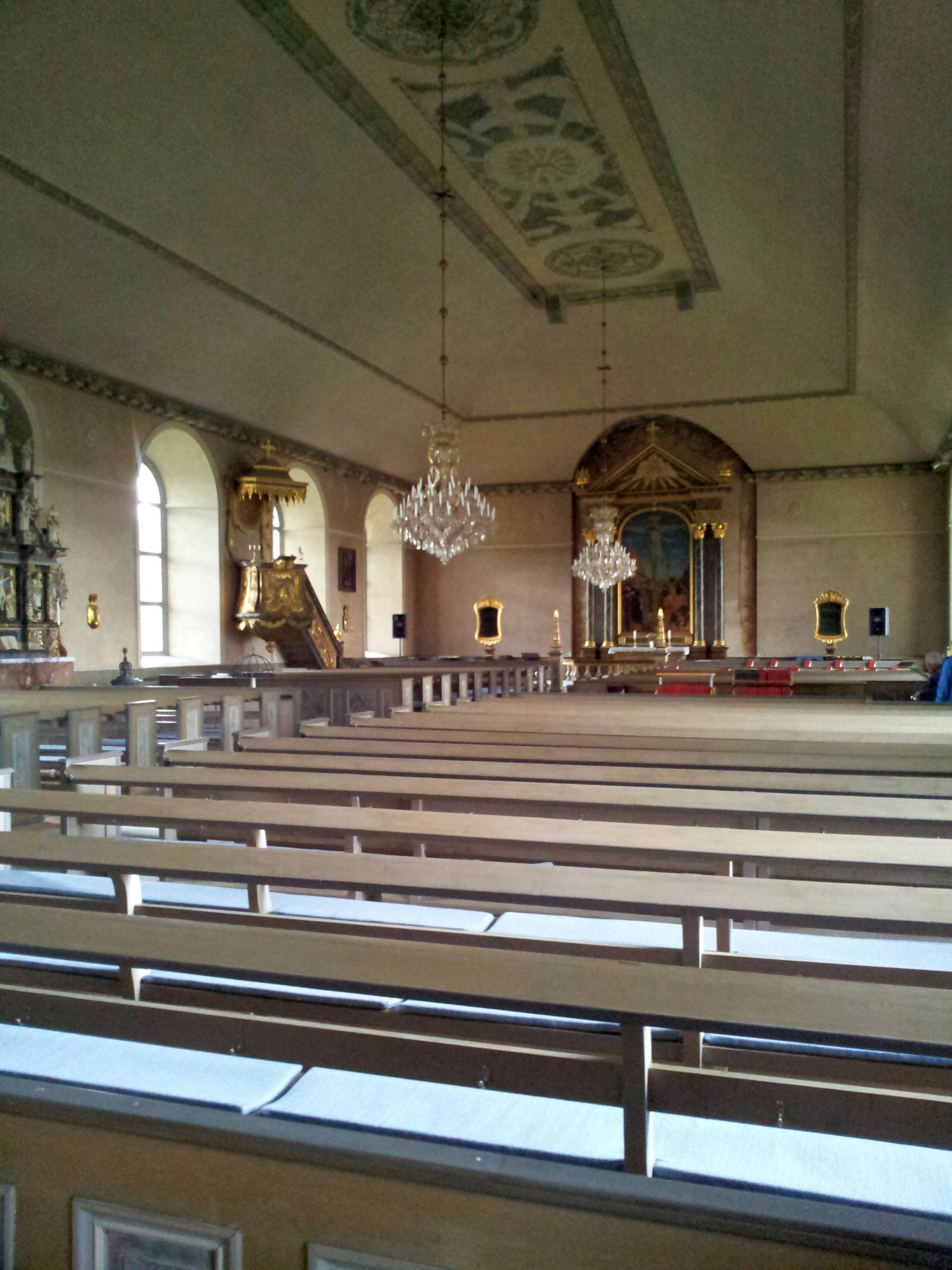 Interiör av Revsunds kyrka, Jämtland, Sverige. Fotograferat den 9 augusti 2016 från strax under läktaren österut.